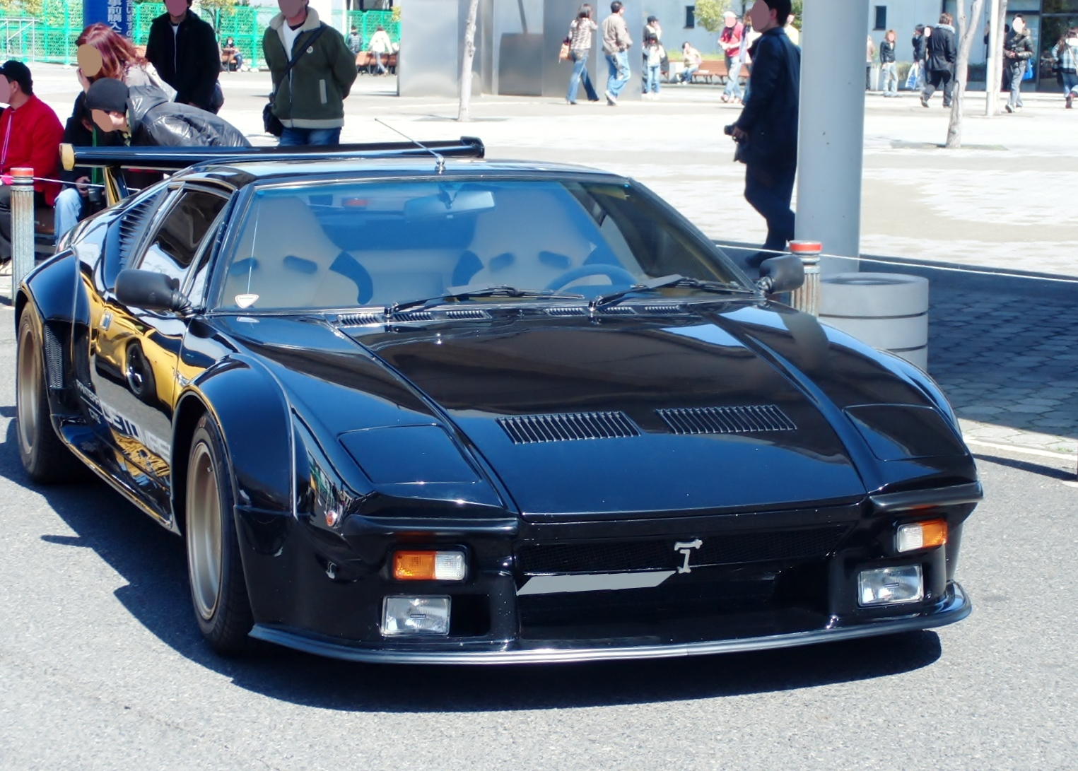 NAGOYAオートトレンド2011においてデ・トマソ・パンテーラGT5を撮影。